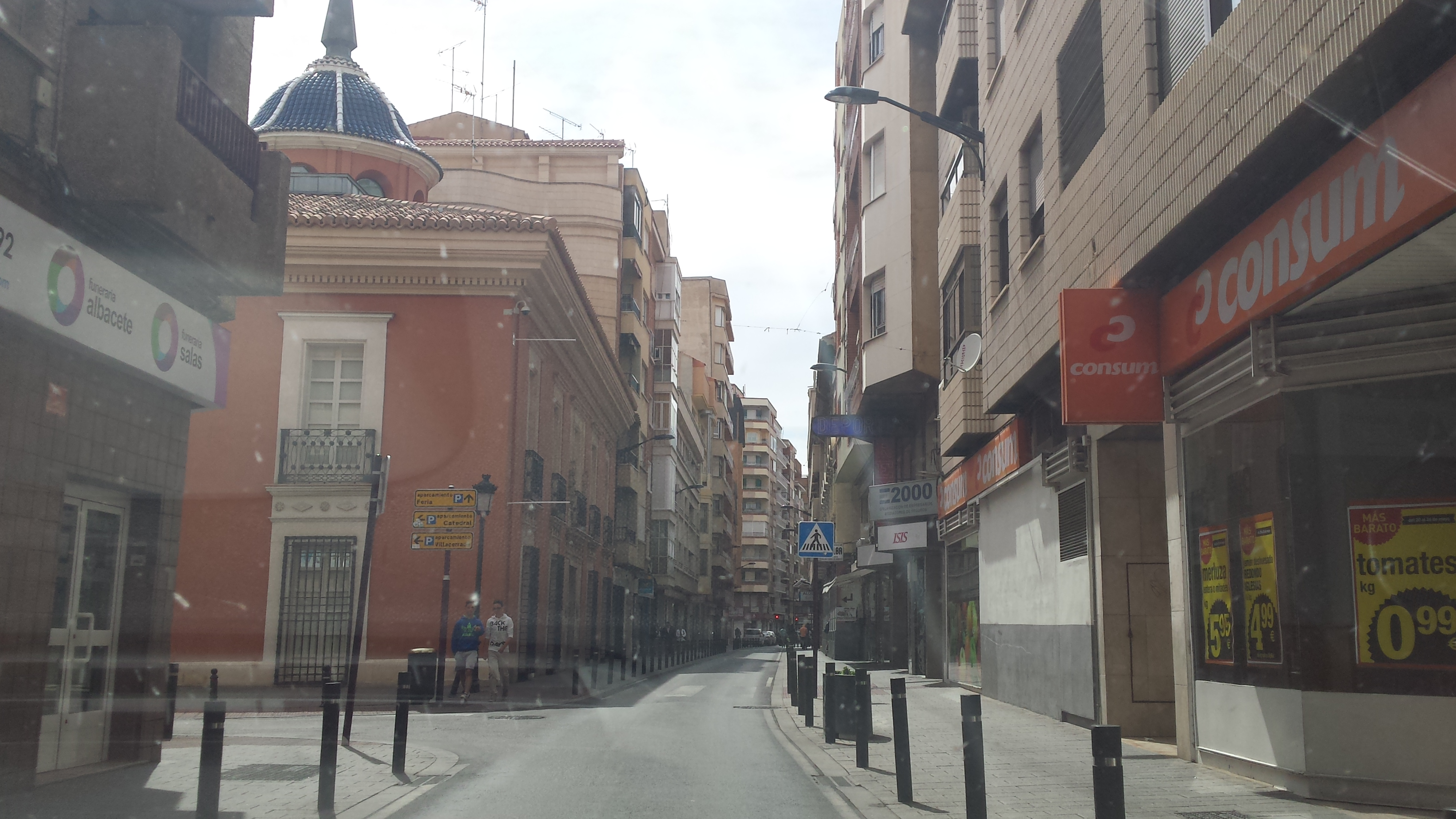 Calle de la Feria. Casa Perona. Albacete